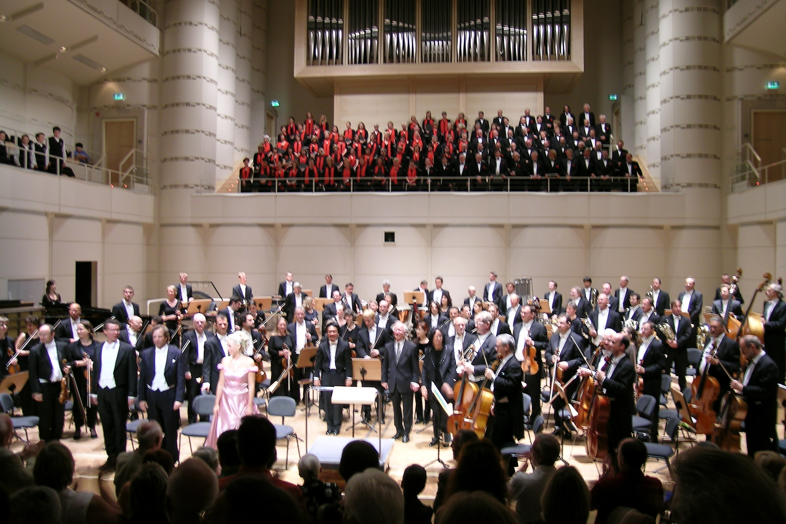 Konzerthaus Dortmund Bühne